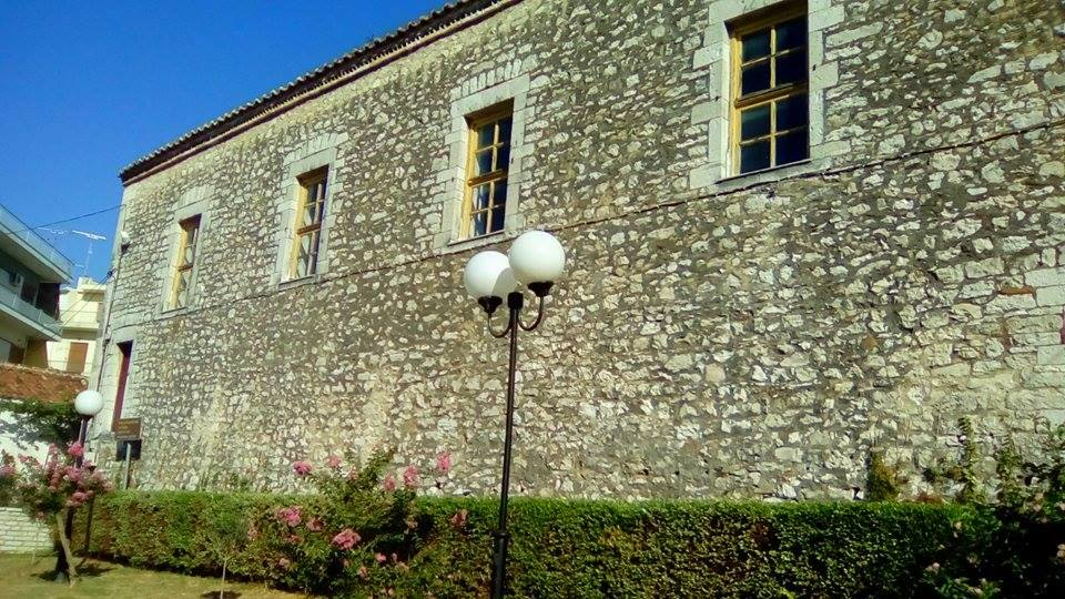 Ναός Αγίου Κωνσταντίνου, Άρτα